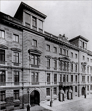 Straßenfront Argentinierstraße